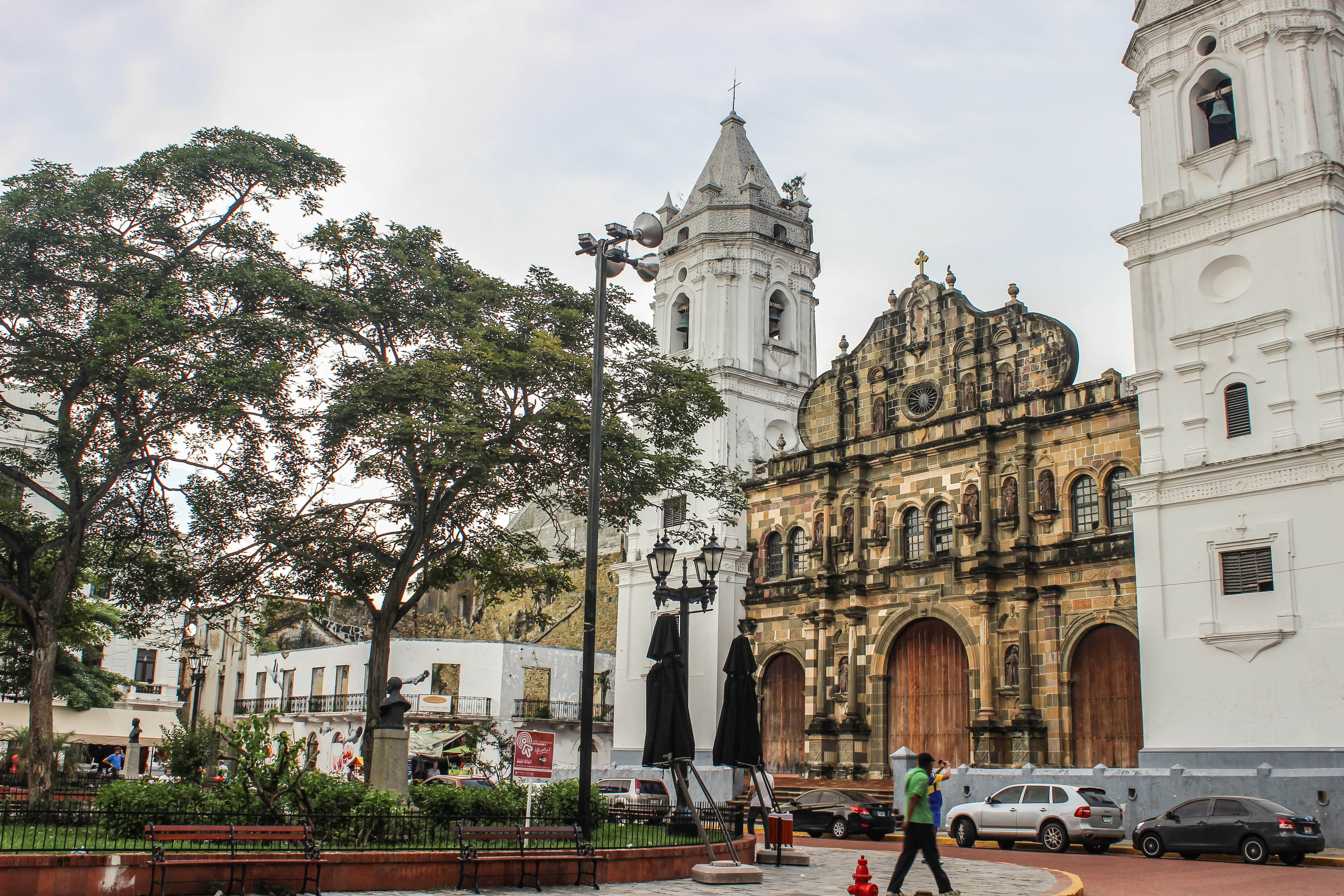 Catedral Metropolitana de Panamá en San Felipe